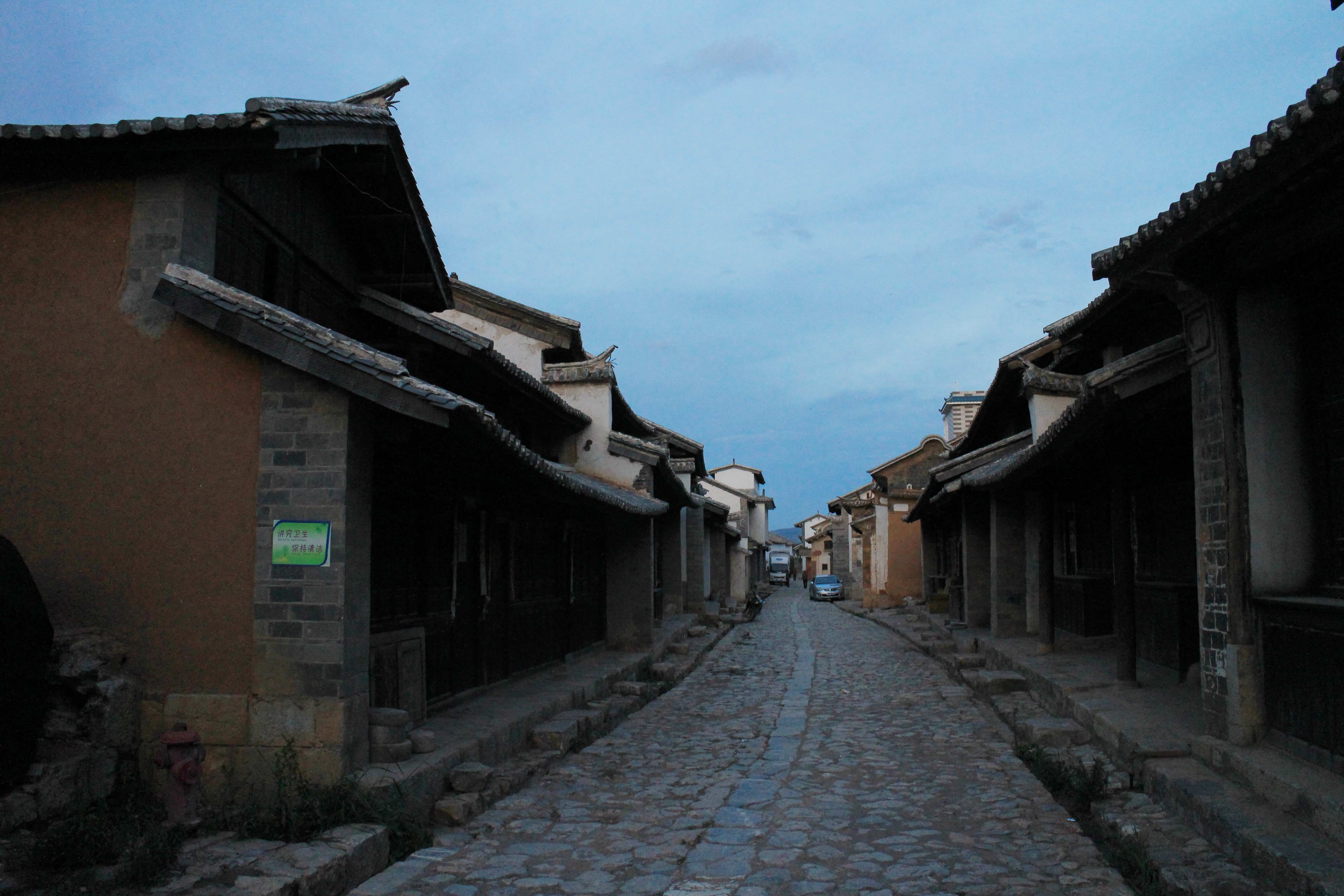 中文（中国大陆）: 云南驿及茶马古道